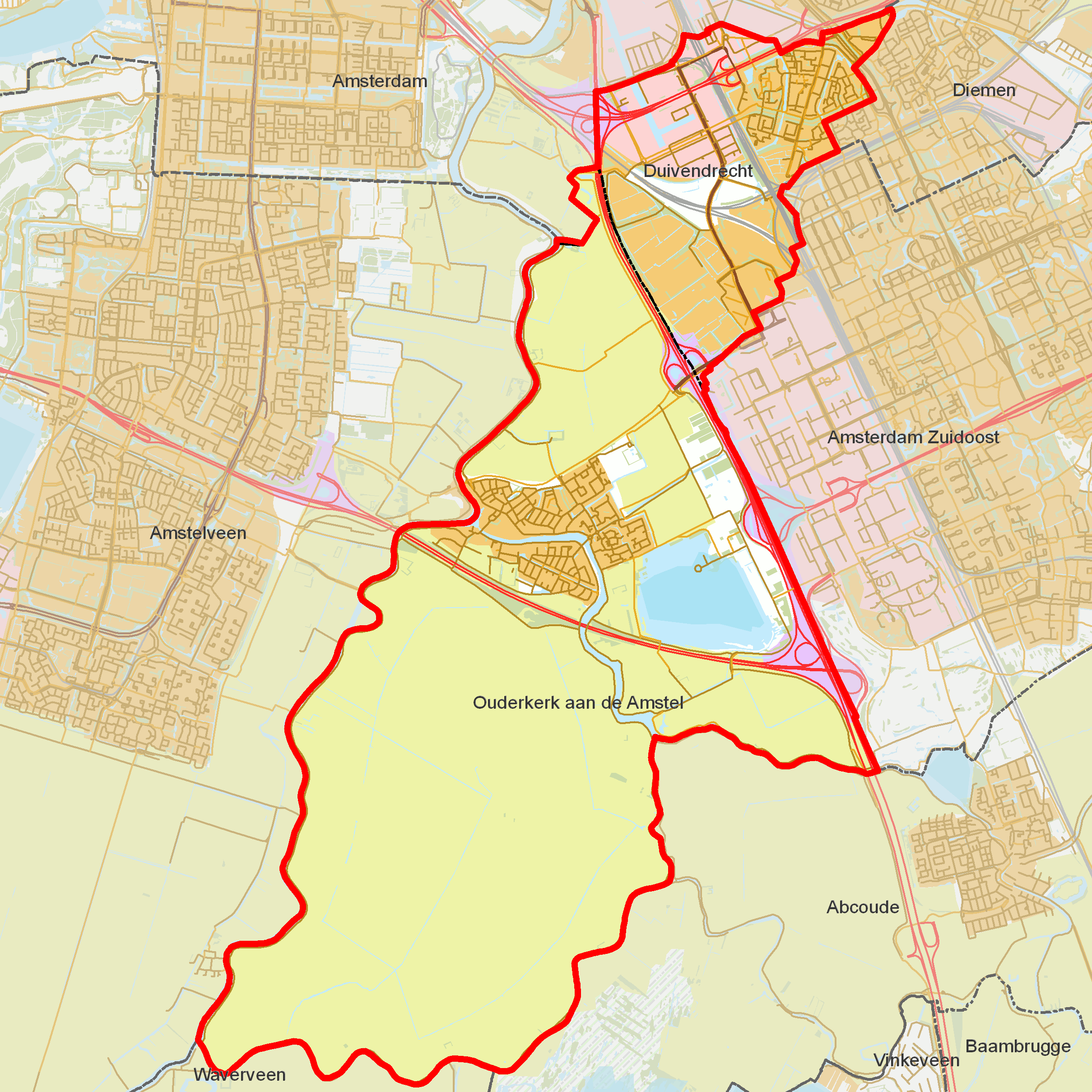 BAG woonplaatsen - Gemeente Ouder-Amstel.png